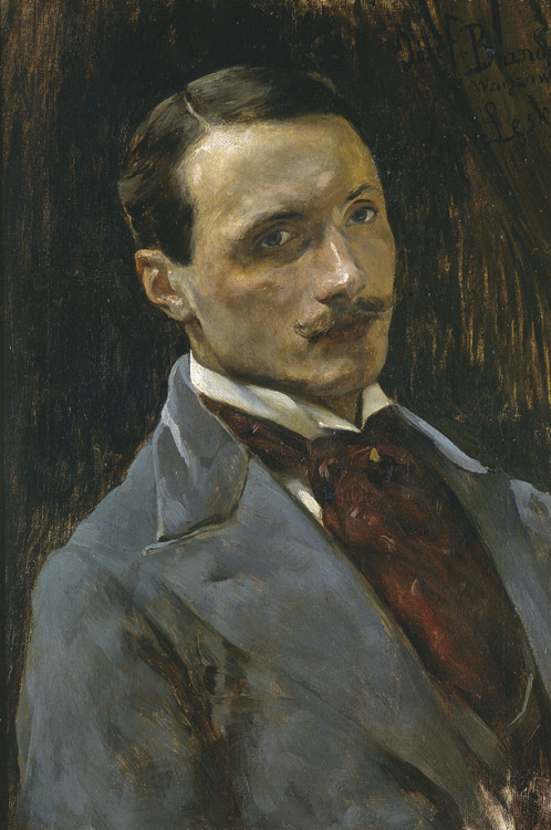 Portrait du peintre Zenon Łęski par Józef Brandt.